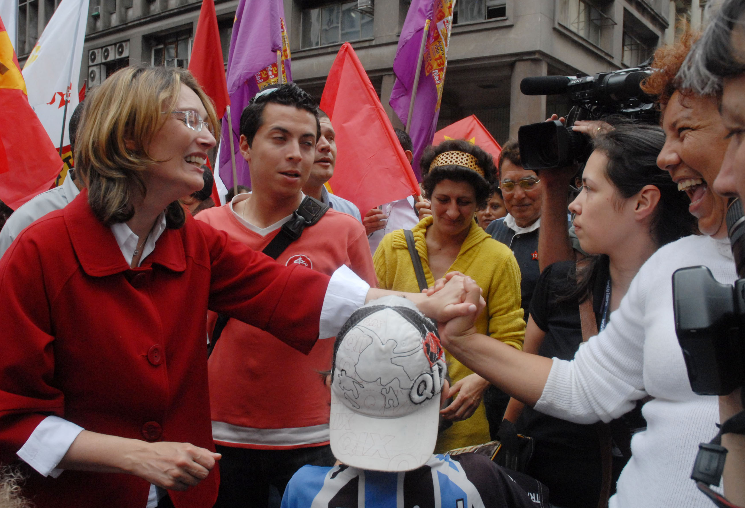 a política brasileira Maria do Rosário em campanha pela prefeitura da cidade de Porto Alegre